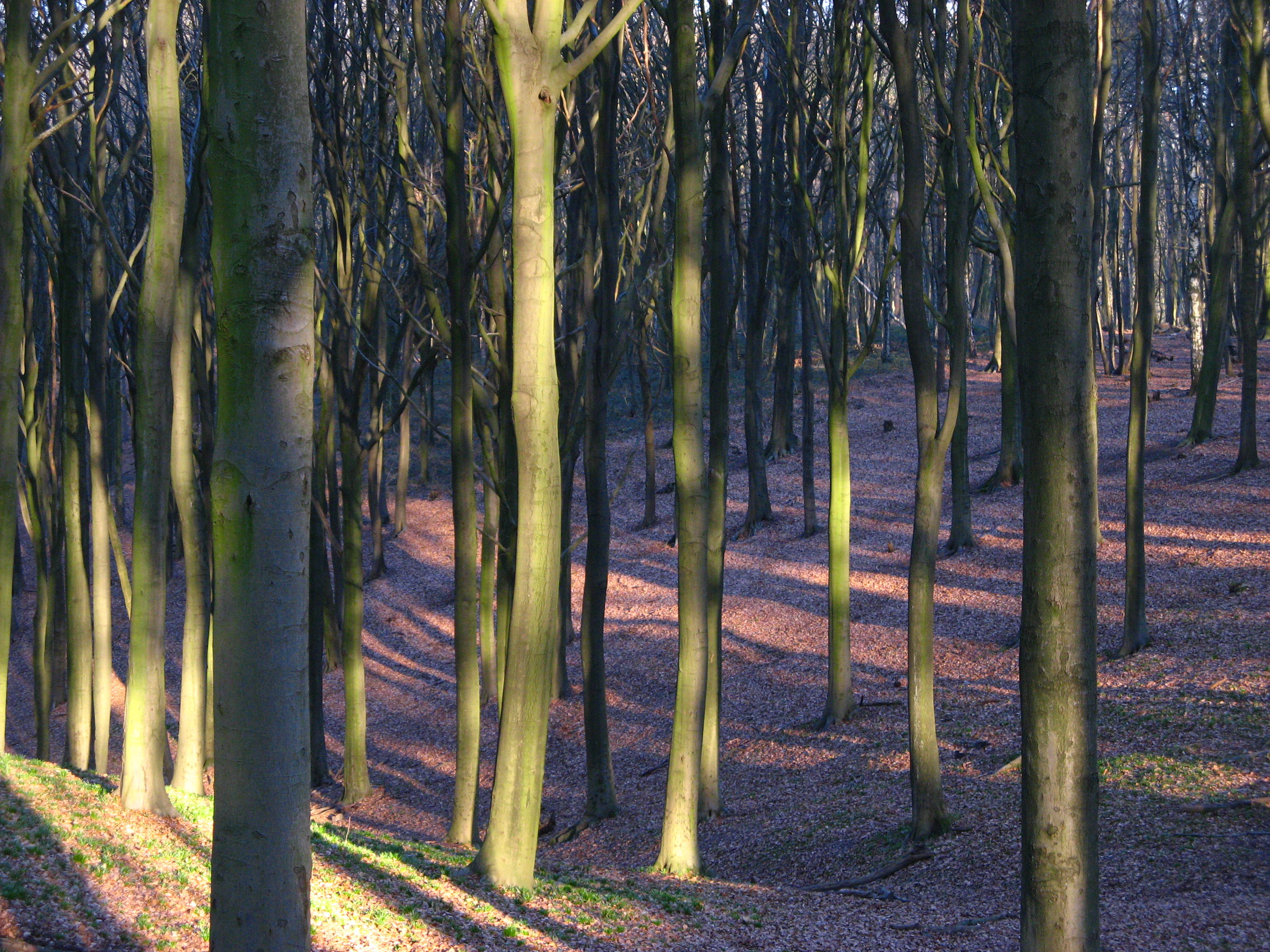 Kluisbos in de winter